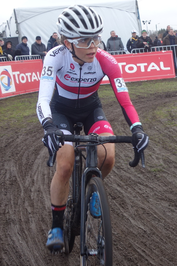 Superprestige veldrijden in de kuil van Zonhoven op zondag 8 december 2019